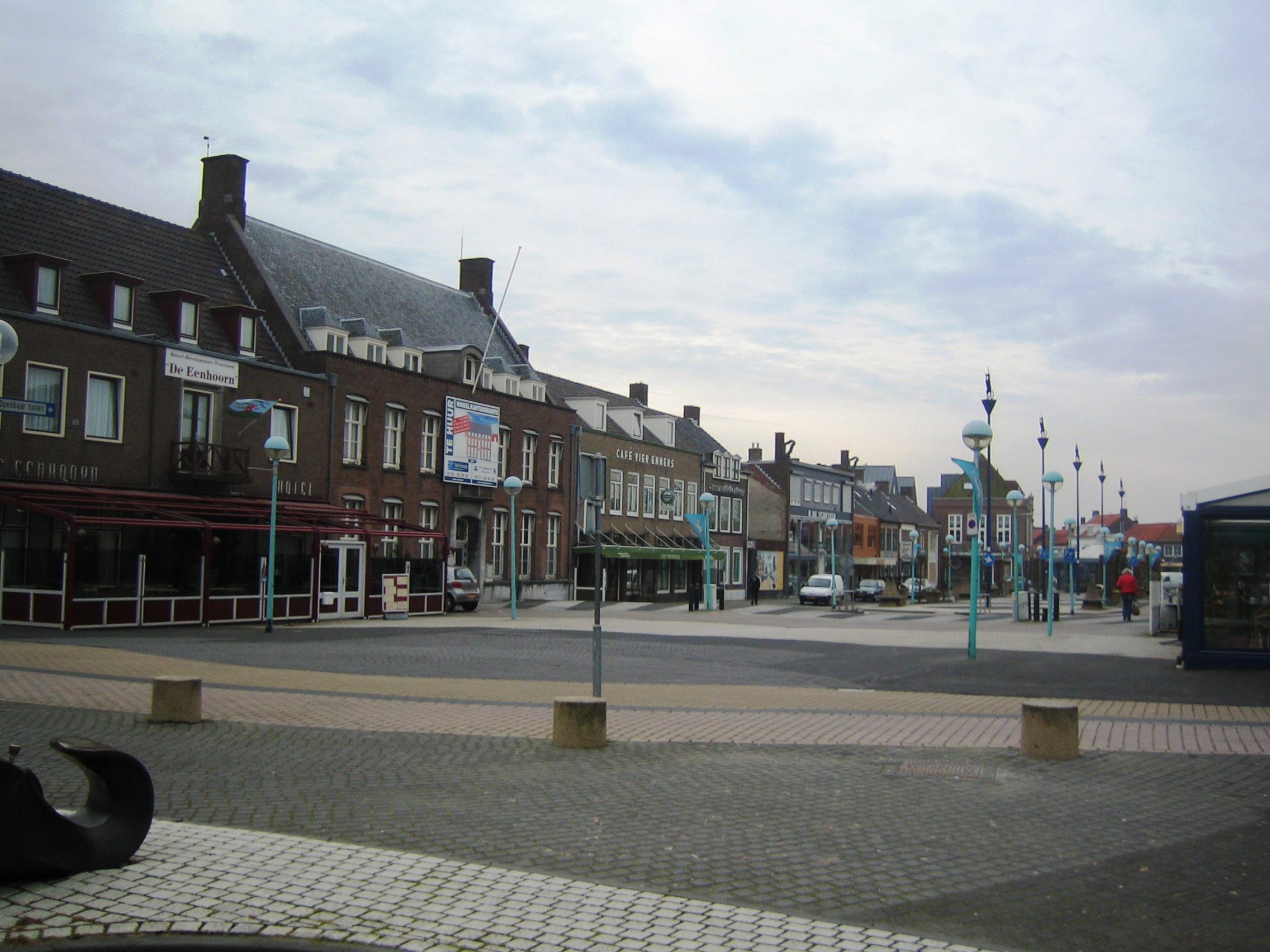 Oostburg pedestrianised